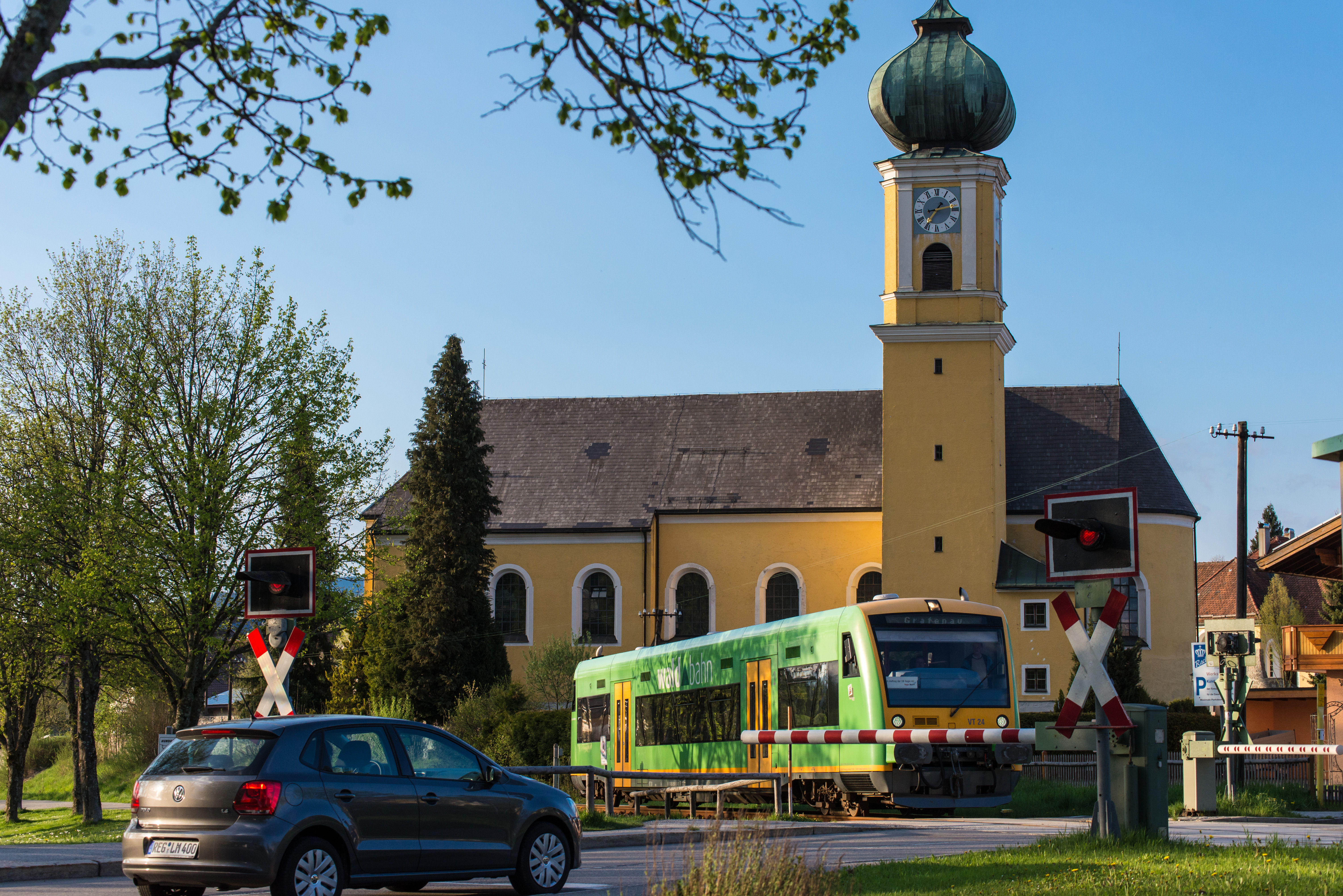 Waldbahn in Frauenau